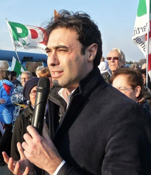 Francesco Forgia, Partito Democratico